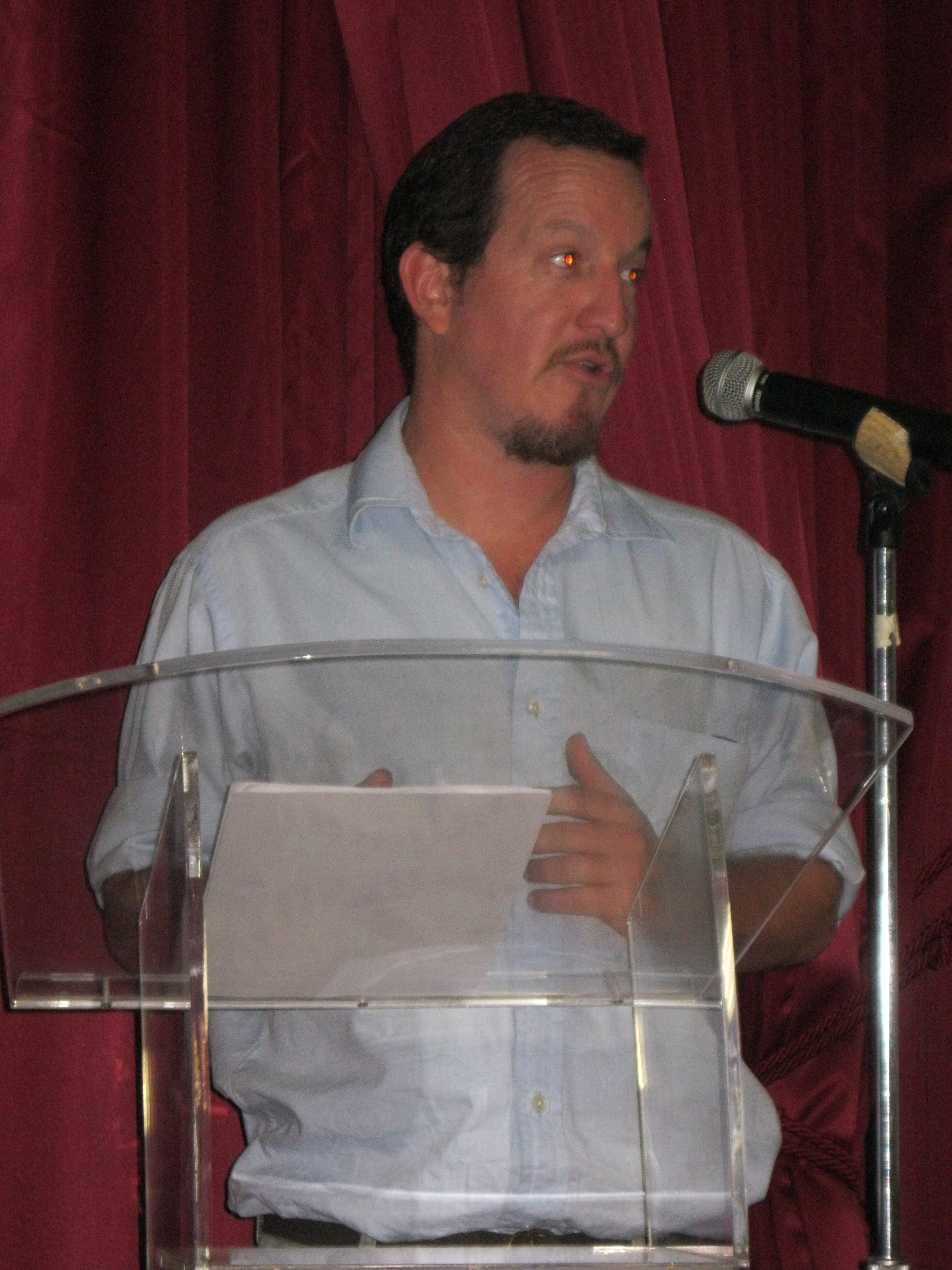 Andrés Crespo en una conferencia realizada en el auditorio del Museo Municipal de Guayaquil en 2012.